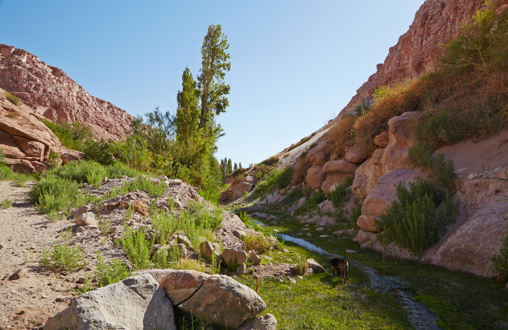 Valle de Jere, en dalgång öster om Toconao.